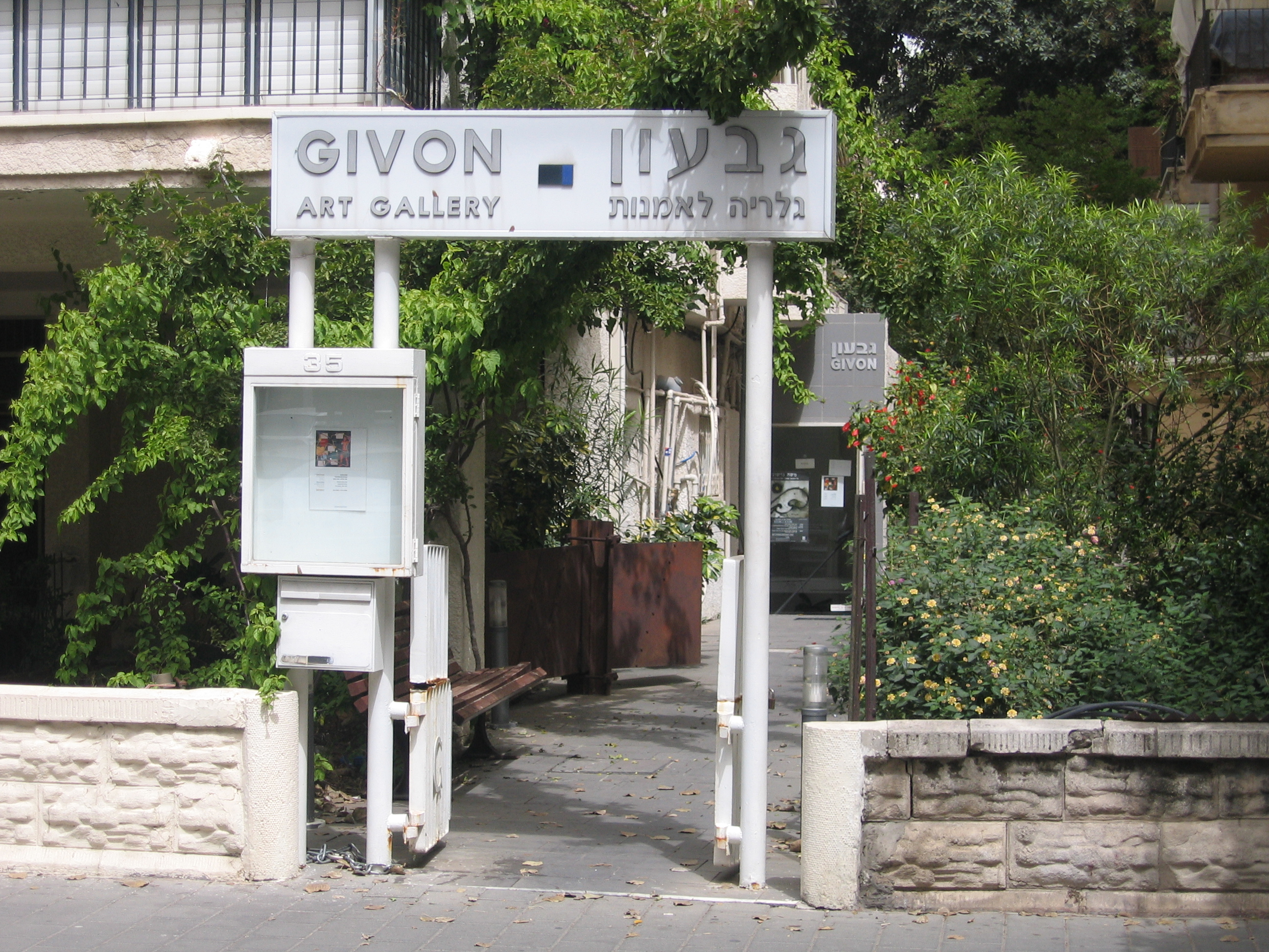 Givon Art Gallery